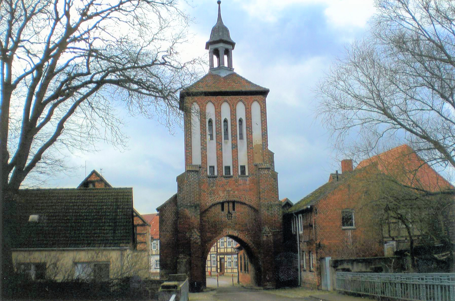 Beustertor (altes Stadttor)